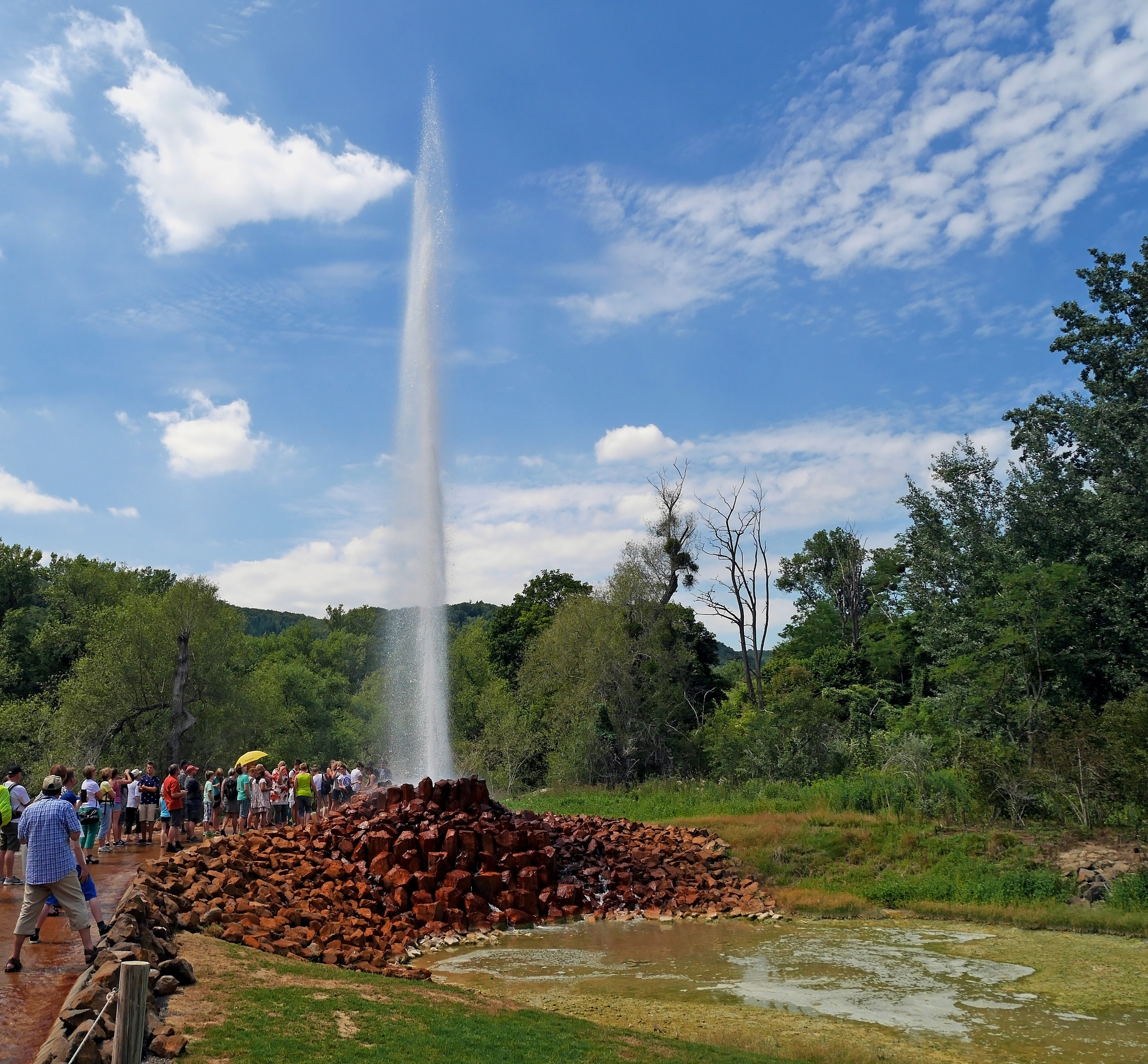 Der Geysir Andernach ist mit 50 bis 60 m Höhe der höchste Kaltwassergeysir der Welt. Der Geysir wurde 1903 erstmals auf einer Halbinsel im Rhein bei Andernach erbohrt. Aufgrund von Schäden im Laufe der Jahre wurde der Gaysir 1957 außer Betrieb gesetzt. Seit 2006 springt der Geysir wieder regelmäßig und im freien Zyklus. Die Eruptionsdauer beträgt etwa 8 Minuten, bei einem natürlichen Intervall von 100 Minuten.